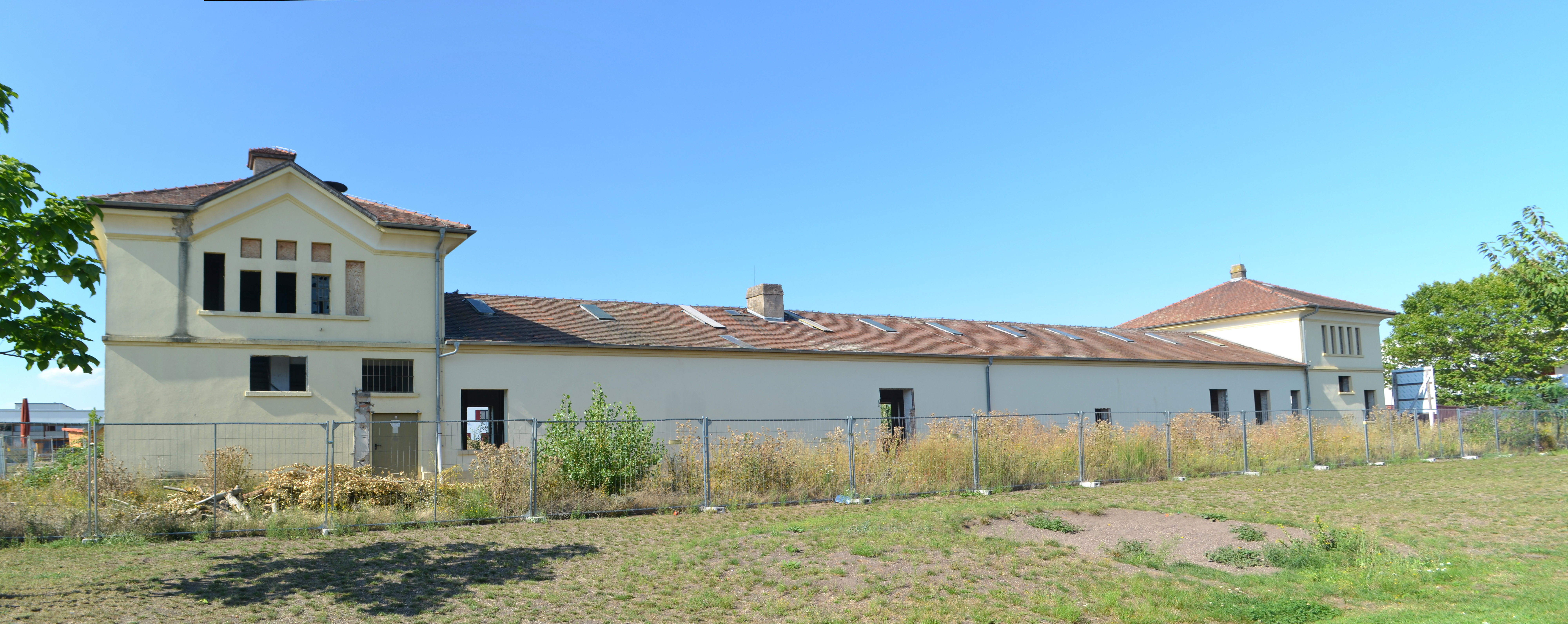 Hattersheim, Werkstattgebäude der ehemaligen Sarotti-Schokoladenfabrik